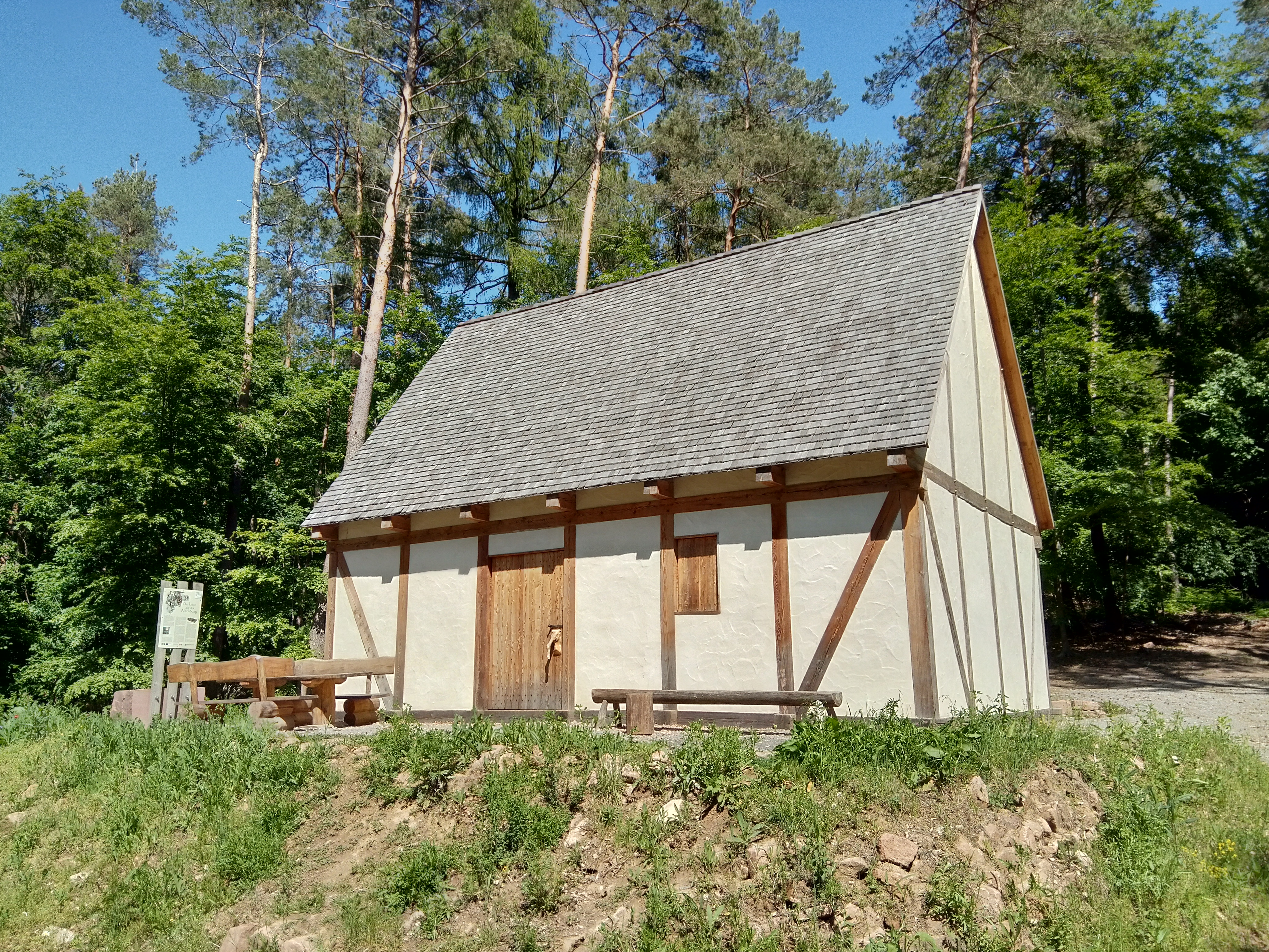 Nachbau einer Keltenhauses am Ringwall der Altenburg (Spessart)